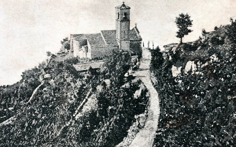 Chiesa di Santa Maria in Valverde e viale della Rimembranza a Marano di Valpolicella (provincia di Verona) in una foto d'epoca